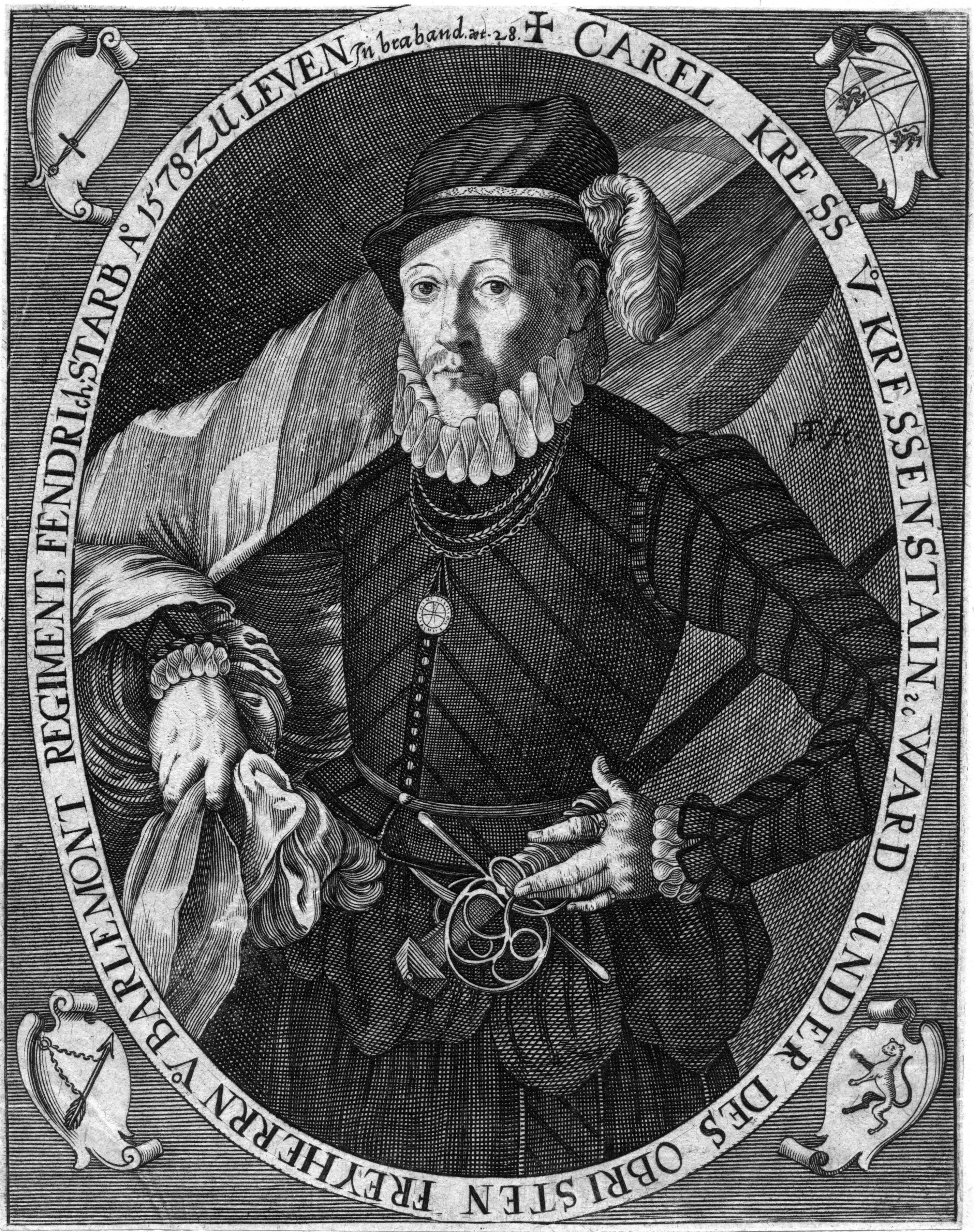 portrait gravé